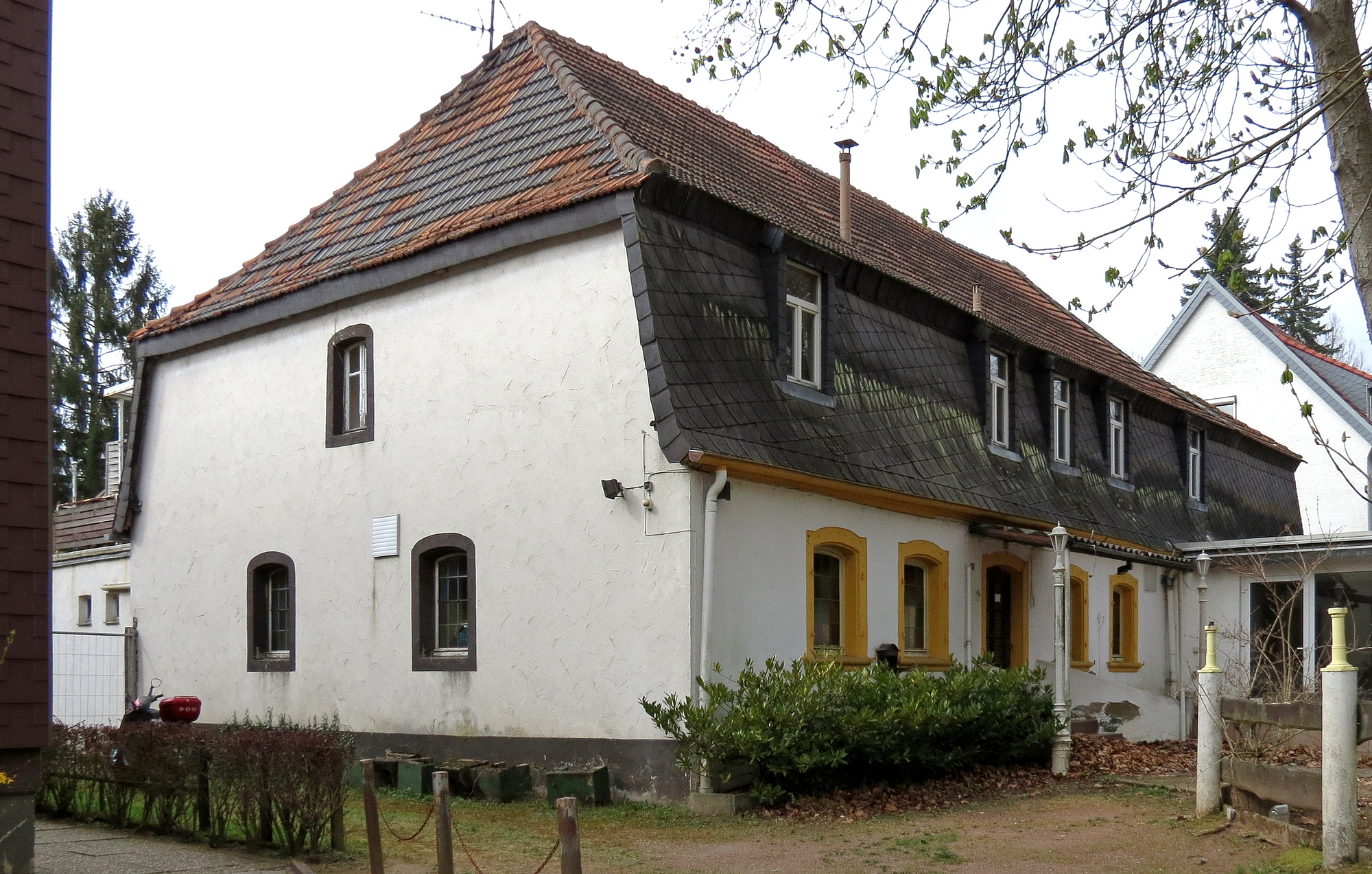 Grülingsstraße 91, Rodenhof, Saarbrücken. Ehemal. Restaurant "Historischer Rodenhof".